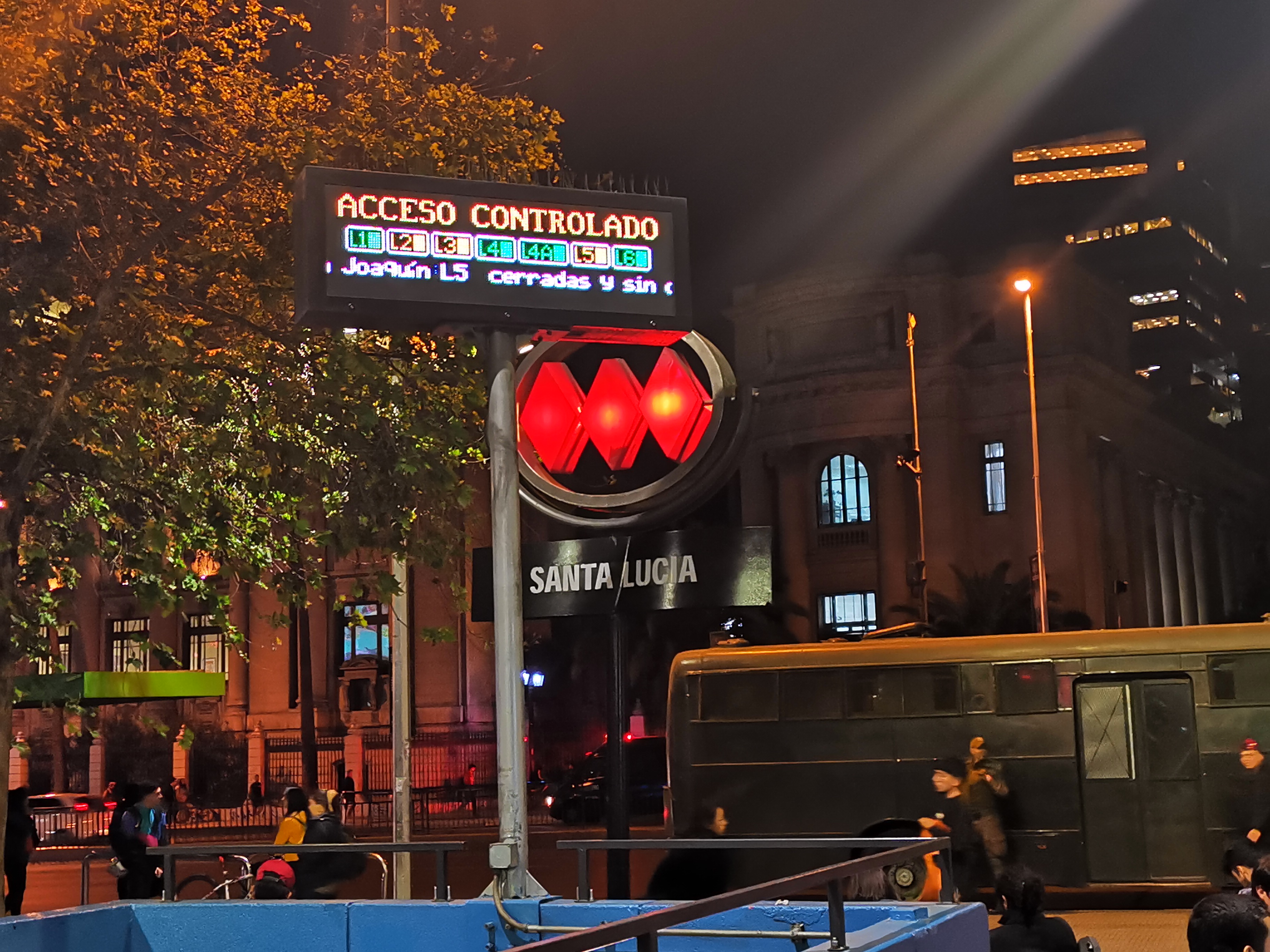 Letrero de la estación Santa Lucía del Metro de Santiago la noche del 17 de octubre indicando el acceso restringido a las estaciones del metro.